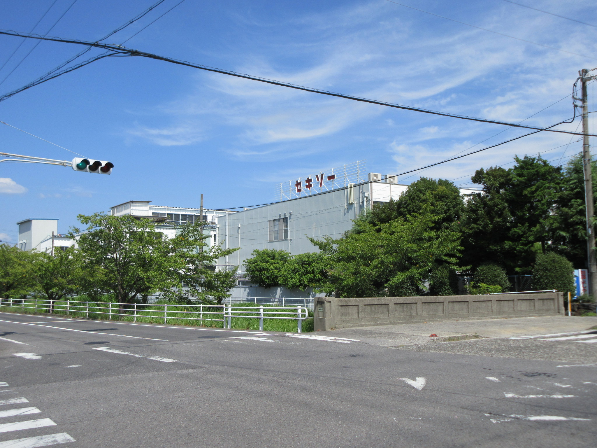 株式会社セキソー本社（岡崎市日名北町）